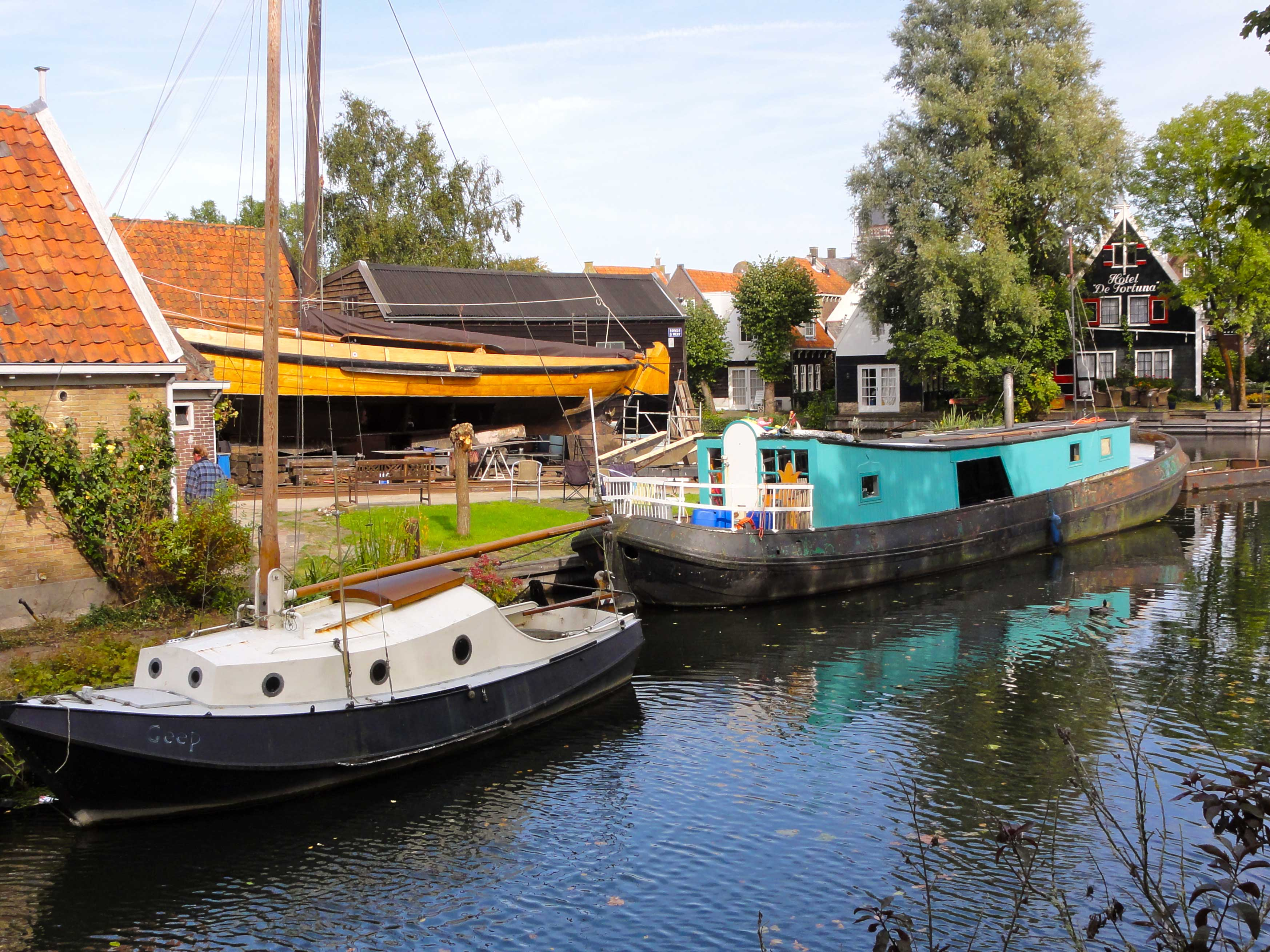 Scheepswerfje aan het Boerenverdriet nabij de Kwakelbrug in Edam